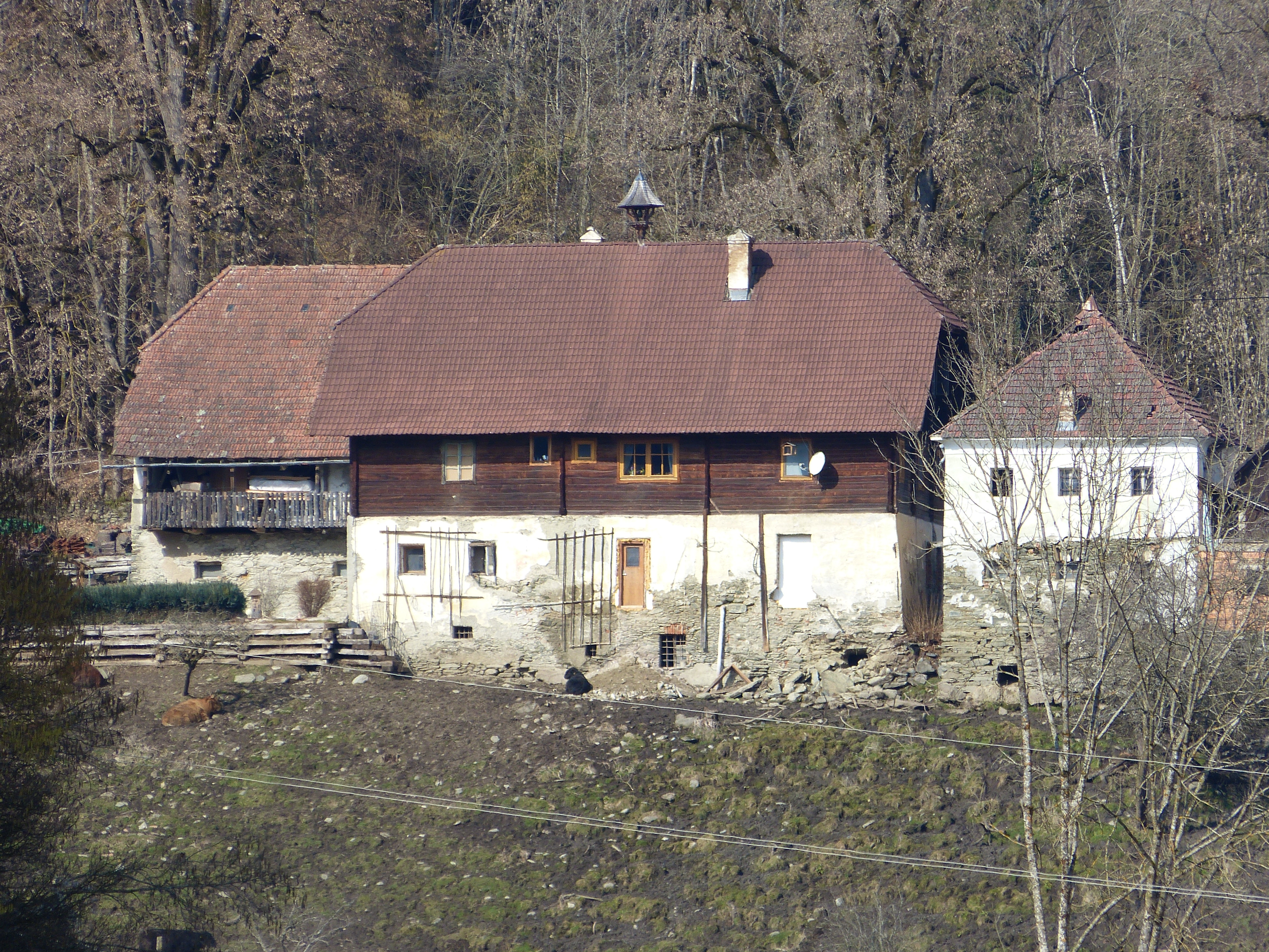 Schoberhof bei Pulst (Gemeinde Liebenfels, Kärnten). vermutlich identisch mit dem von Ende des 14. bis ins 17. Jahrhundert mehrfach genannten Zemnik oder Zenneg.